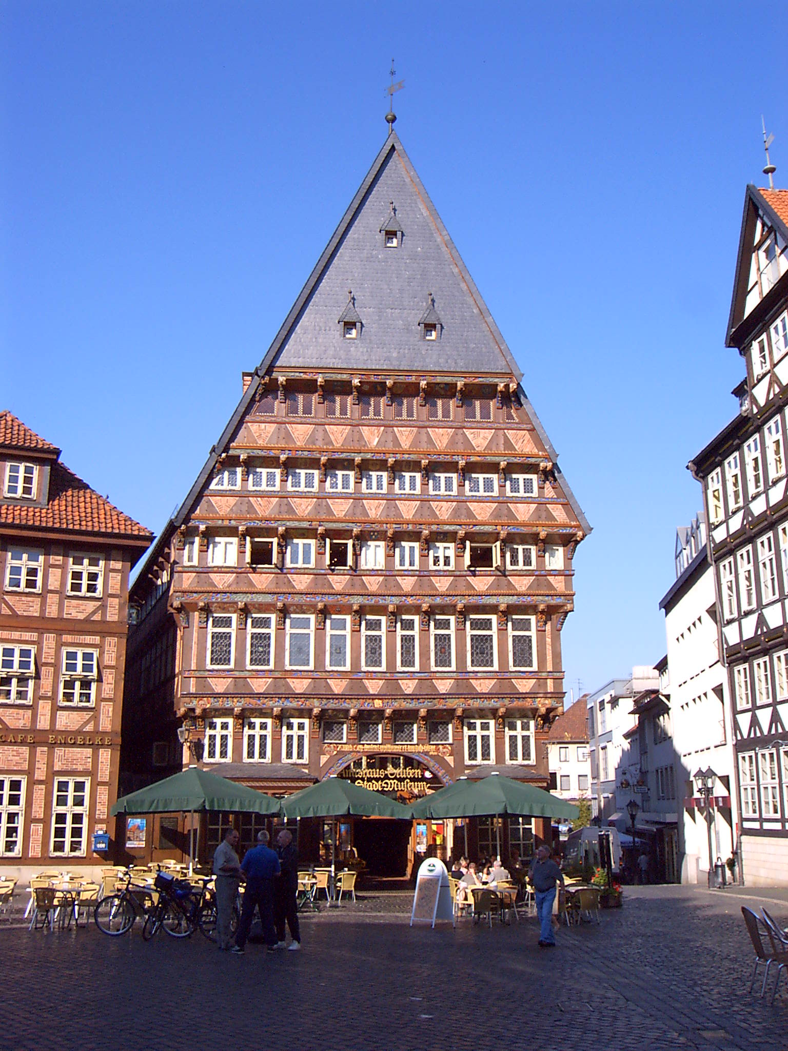 „Knochenhaueramtshaus“ in Hildesheim, Deutschland 2005. Der Originalbau wurde 1945 zerstört. Heute steht an selber Stelle ein originalgetreuer Nachbau. Provided by the photographer User:Fundistephan to German Wikipedia on August 6, 2005.